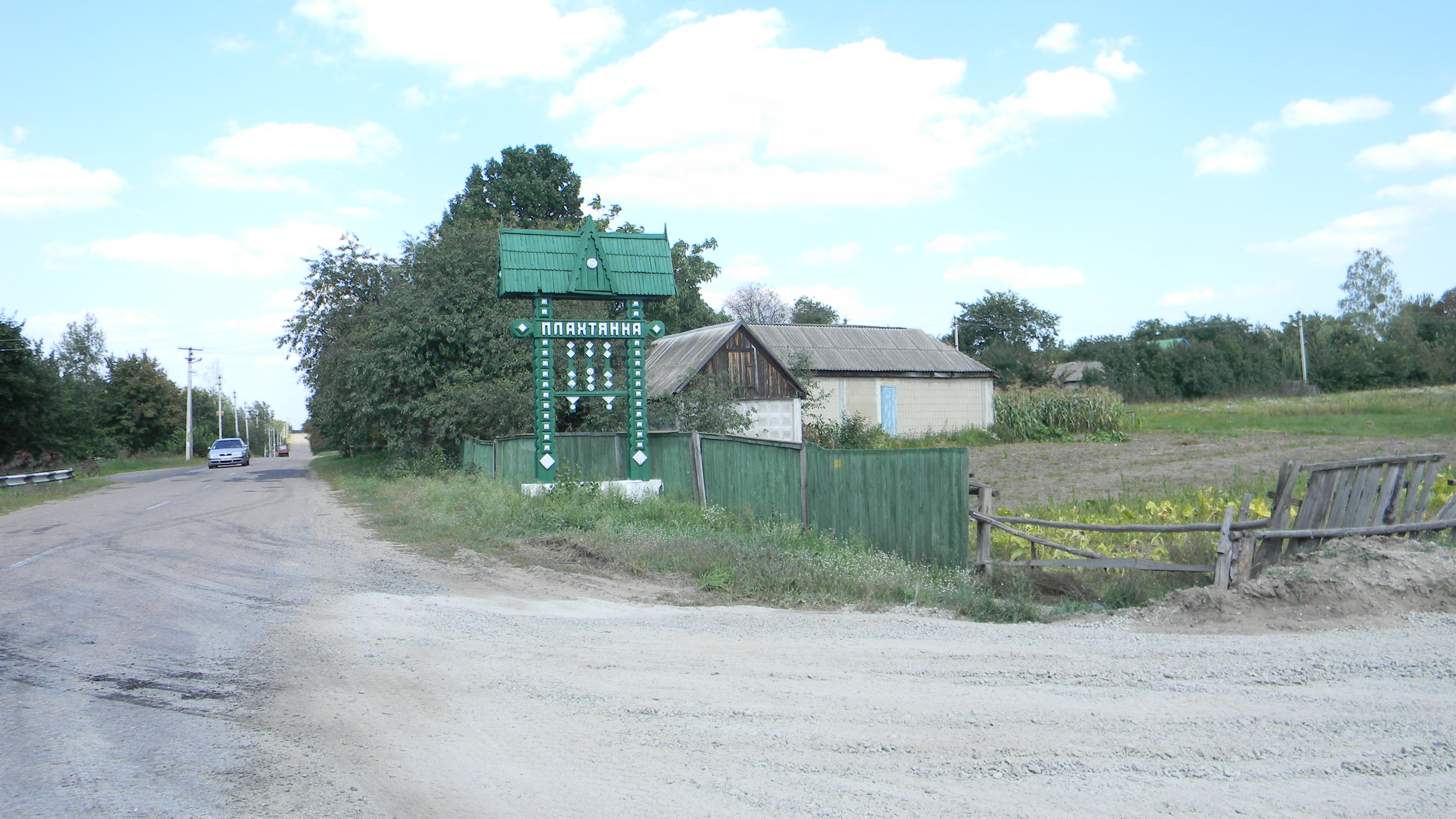 В'їзний знак у Плахтянку